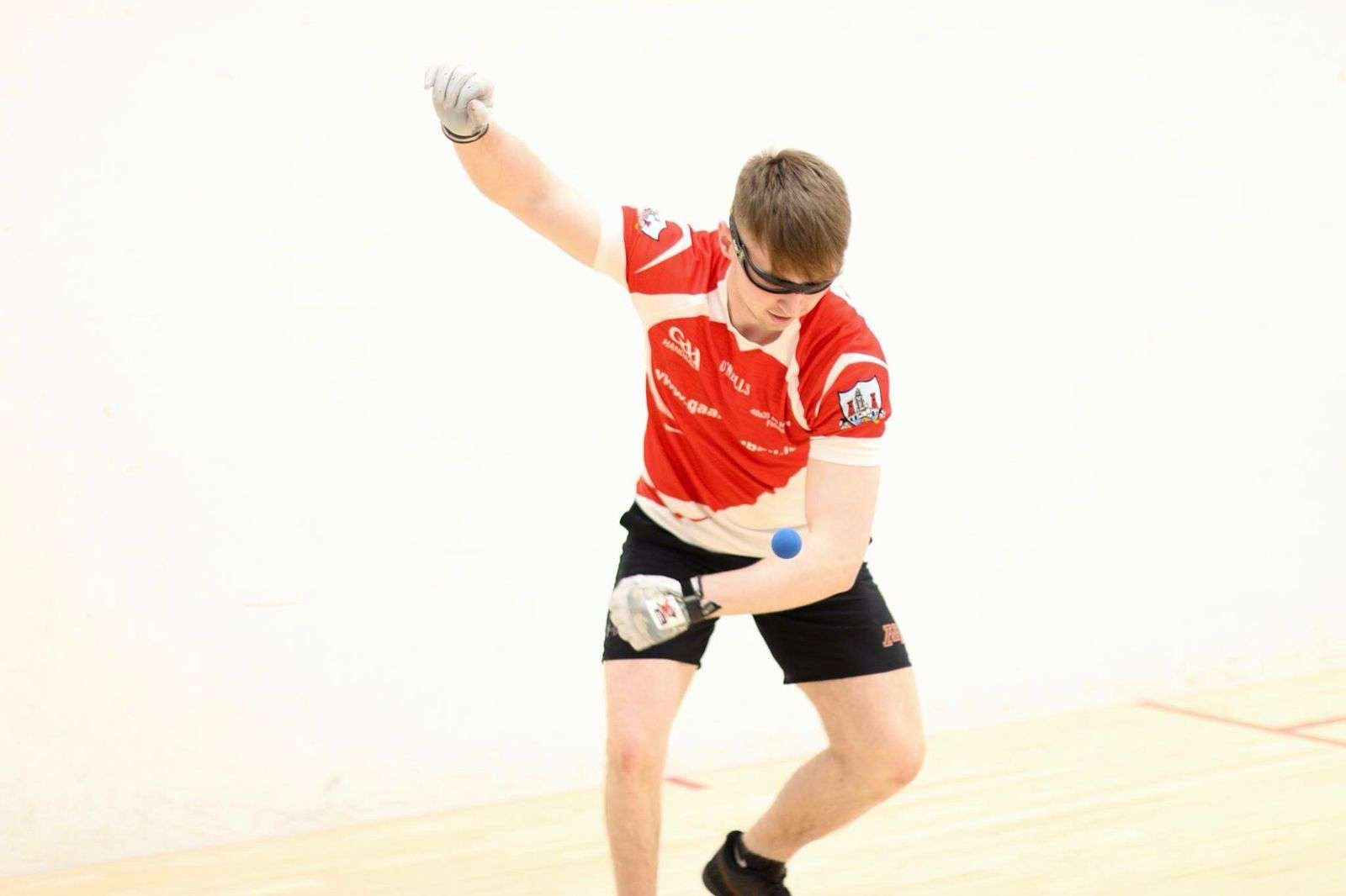 David Walsh setting up to hit the ball